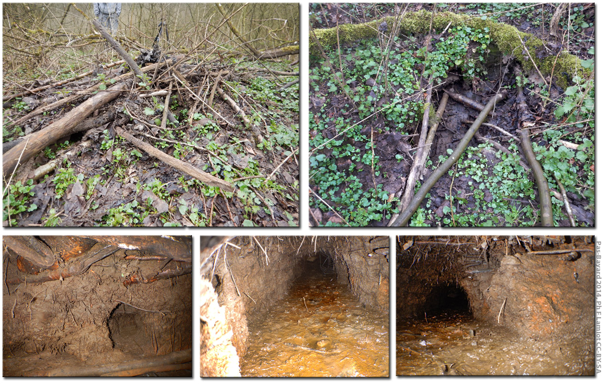 aspects extérieur (aérations et accumulations de quelques branches) et intérieur du gîte du Castor (en bas galerie d'accès au terrier (galerie normalement immergée, mise hors d'eau par une baisse du niveau de l'eau)